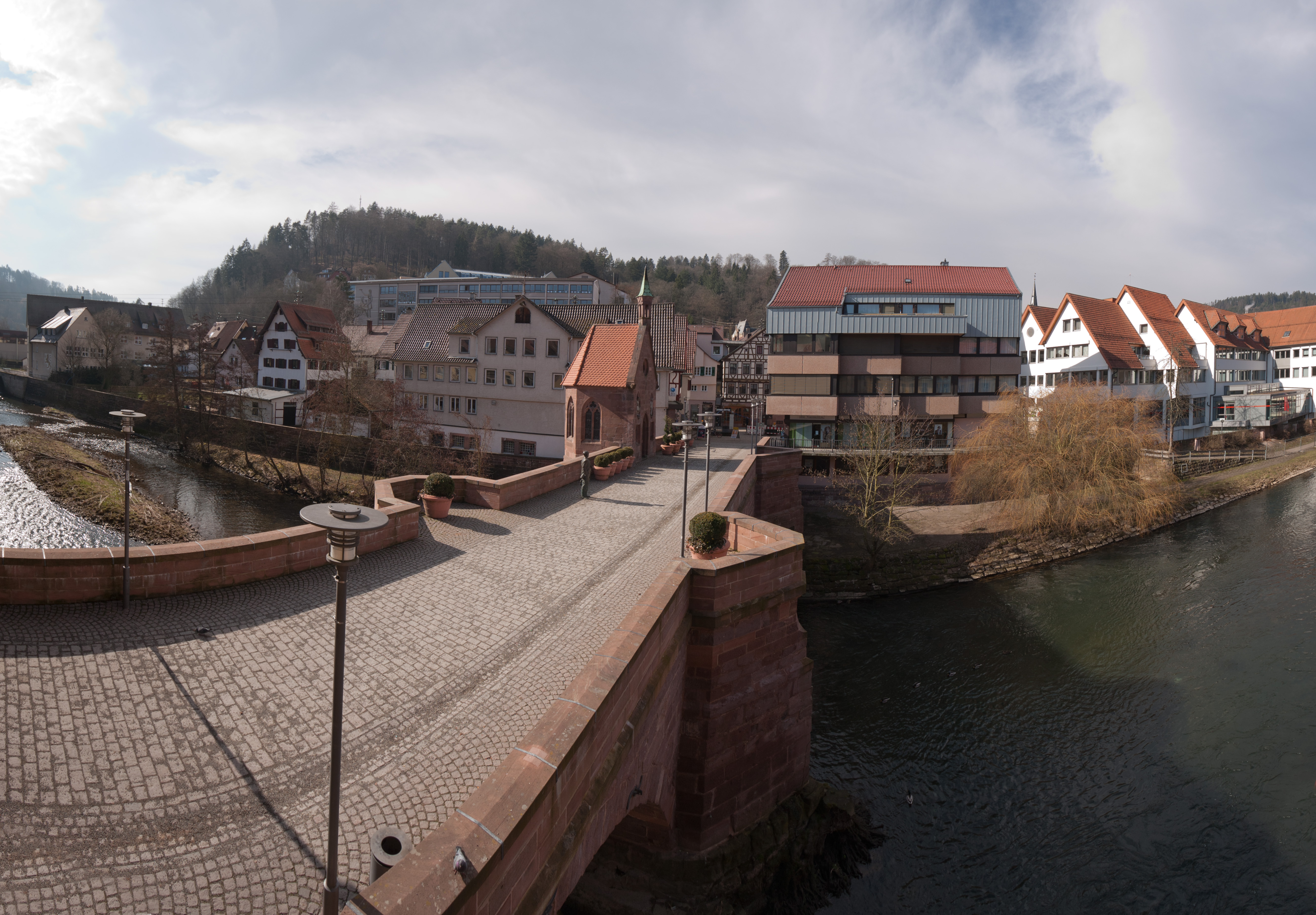 Die Nikolausbrücke in Calw an der Nagold mit Nikolauskapelle und Hermann-Hesse-Skulptur